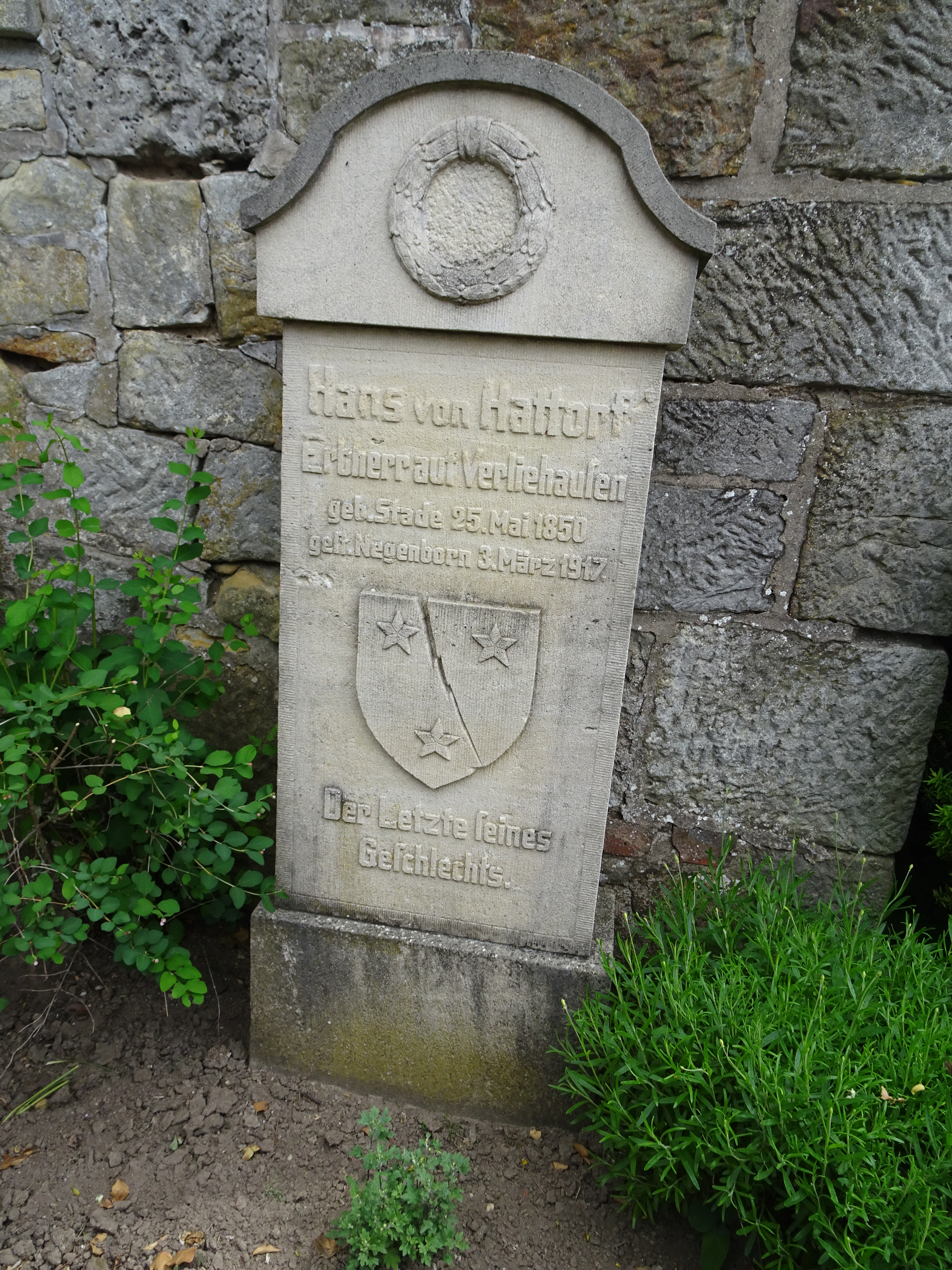 Grabstein "Hans von Hattorf, Erbherr auf Verliehausen, geb. Stade 25. Mai 1850, gest. Negenborn 3. März 1917, Der Letzte seines Geschlechts" am Erbbegräbnis von Hattorf auf dem Friedhof in Lemmie, Niedersachsen.